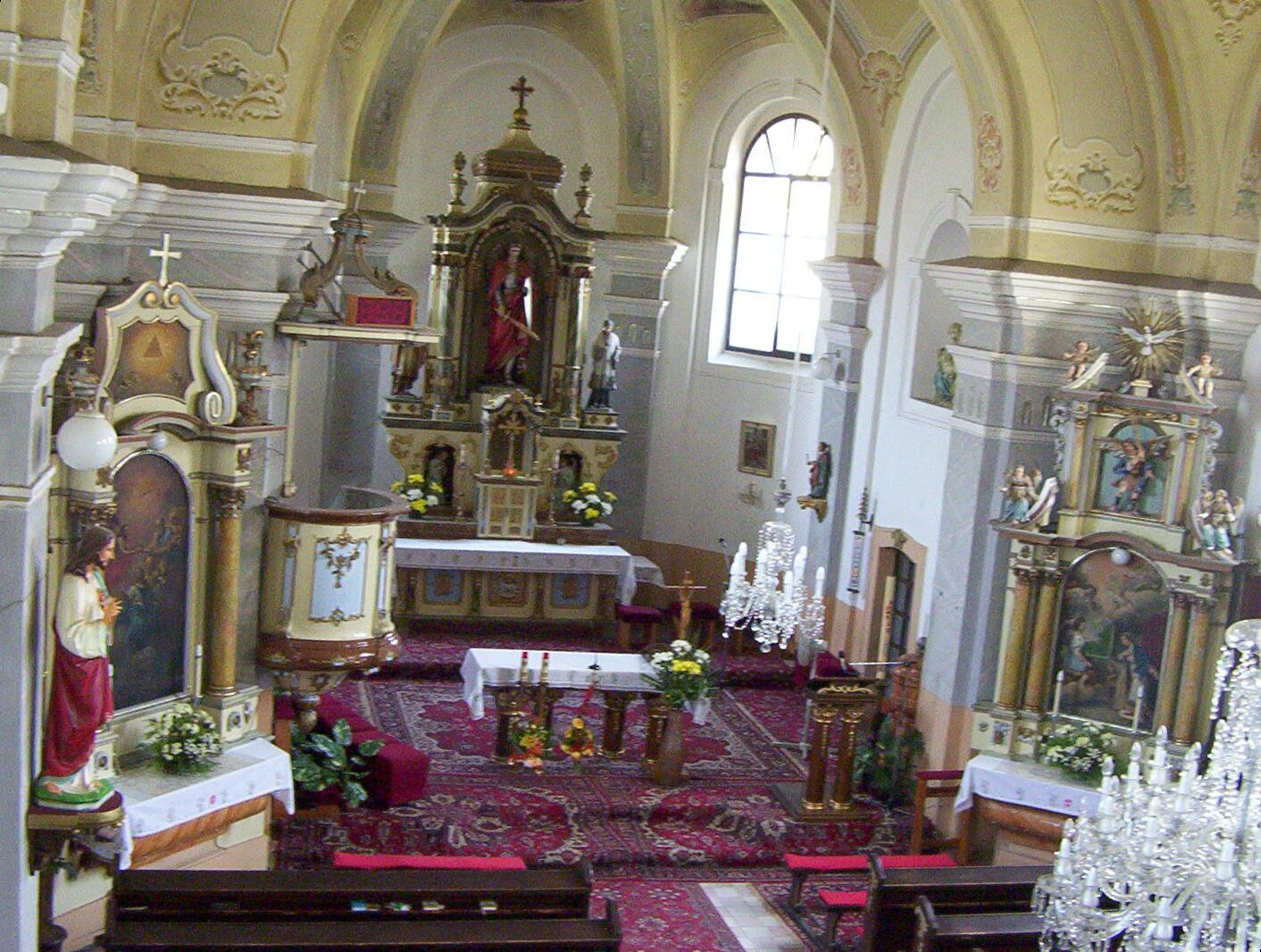 Jasenica - Farský kostol sv. Michala Archanjela, pohľad na hlavný oltár, socha sv. Michala Archanjela